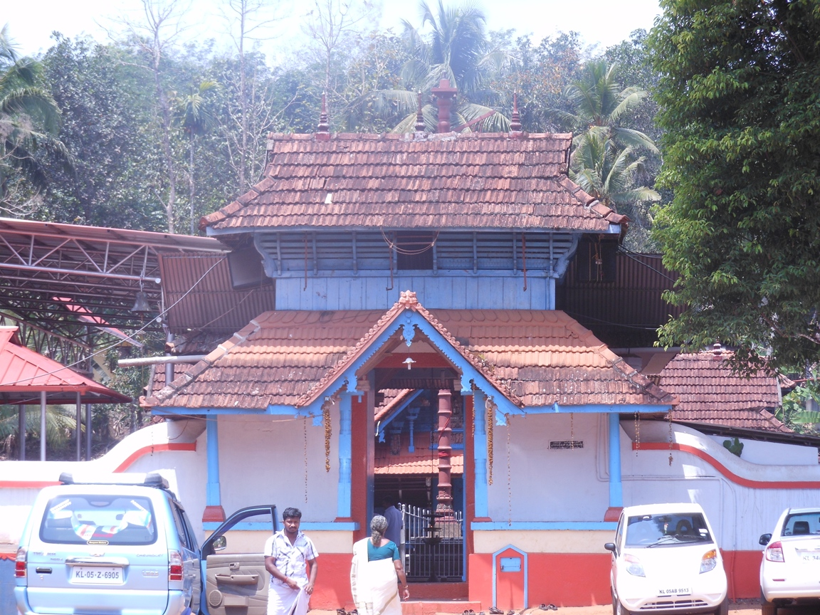 പുലിയന്നൂർ മഹാദേവക്ഷേത്രം